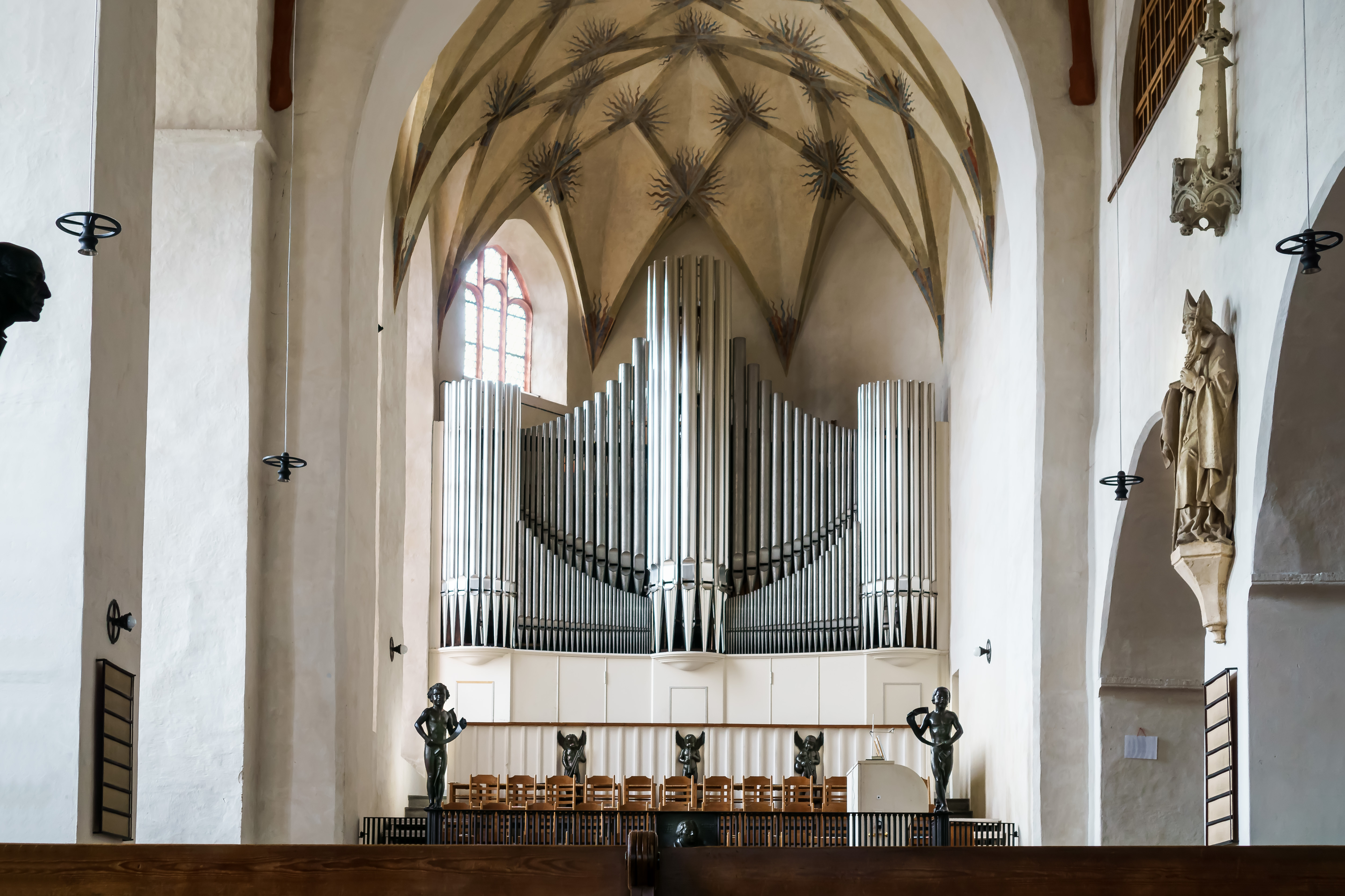 Dom St. Marien Wurzen, Mittelschiff, Westchor und Orgel